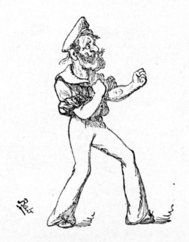 Illustration zum Lied “A British Tar” aus der Operette H.M.S. Pinafore, aus einer Ausgabe von W.S. Gilberts Bab Ballads von 1906